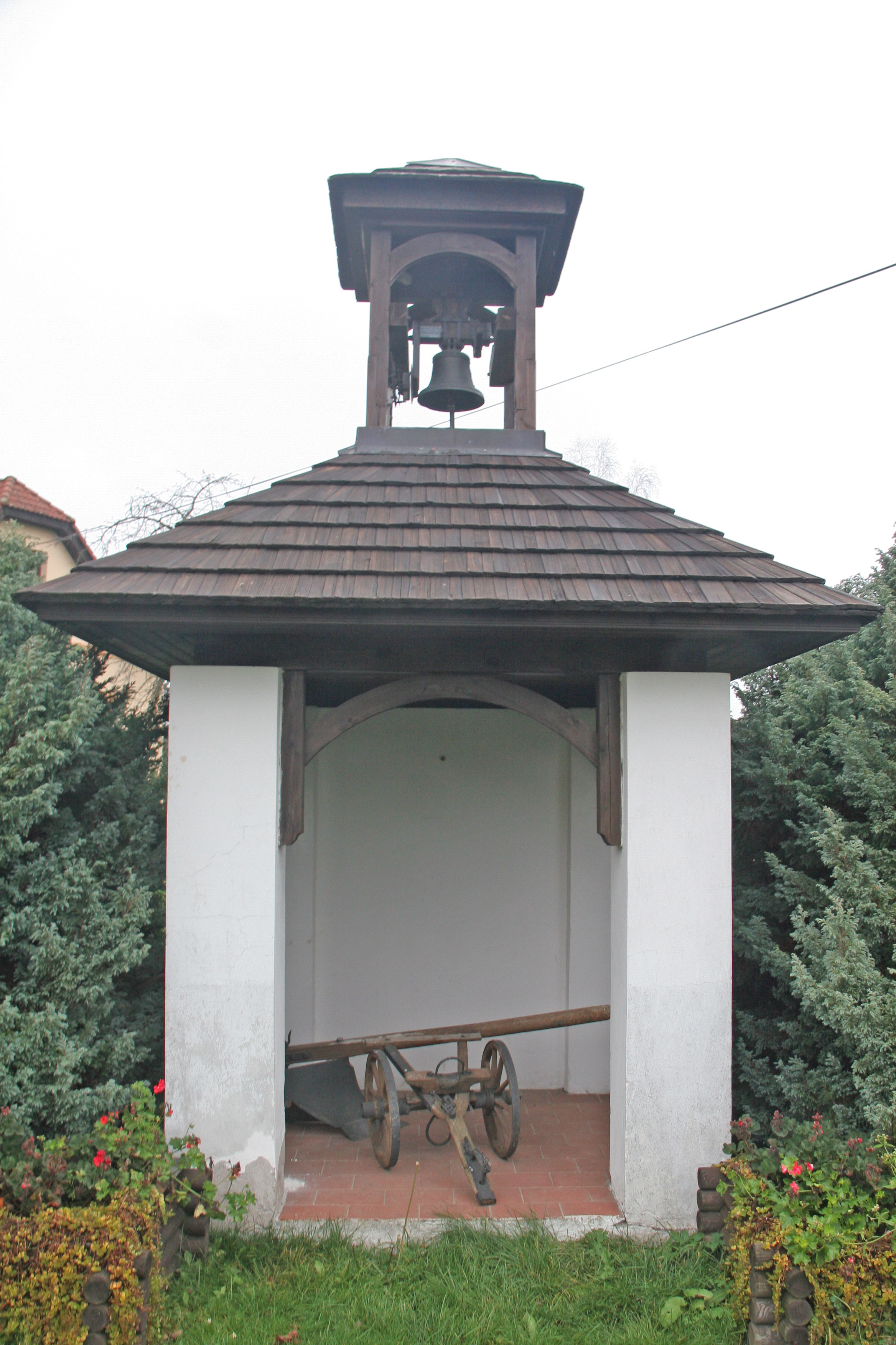 Krásné zvonička